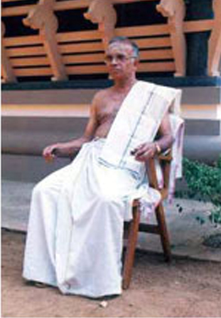 Kanipayyoor Krishnan Namboothiripad